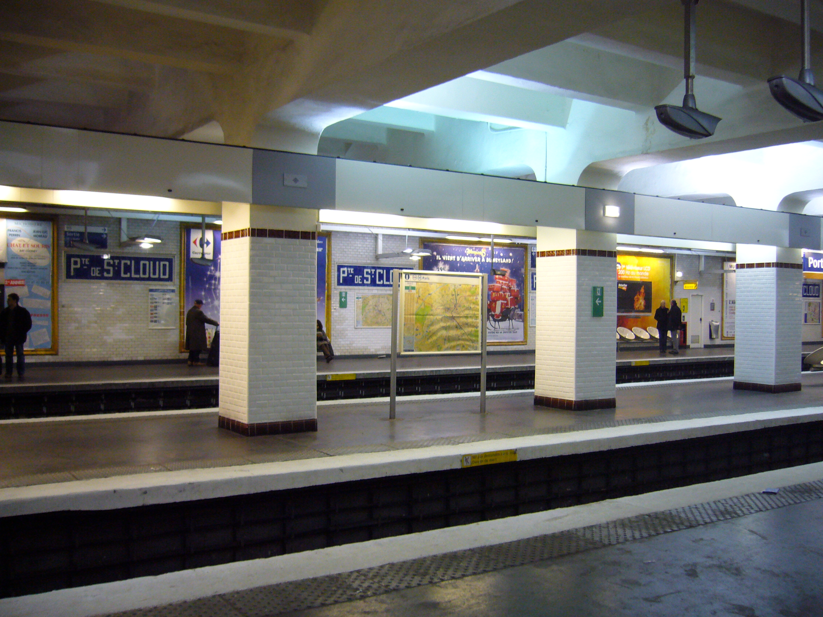 Les quais de la station Porte de Saint Cloud sur la ligne 9 du métro de Paris.